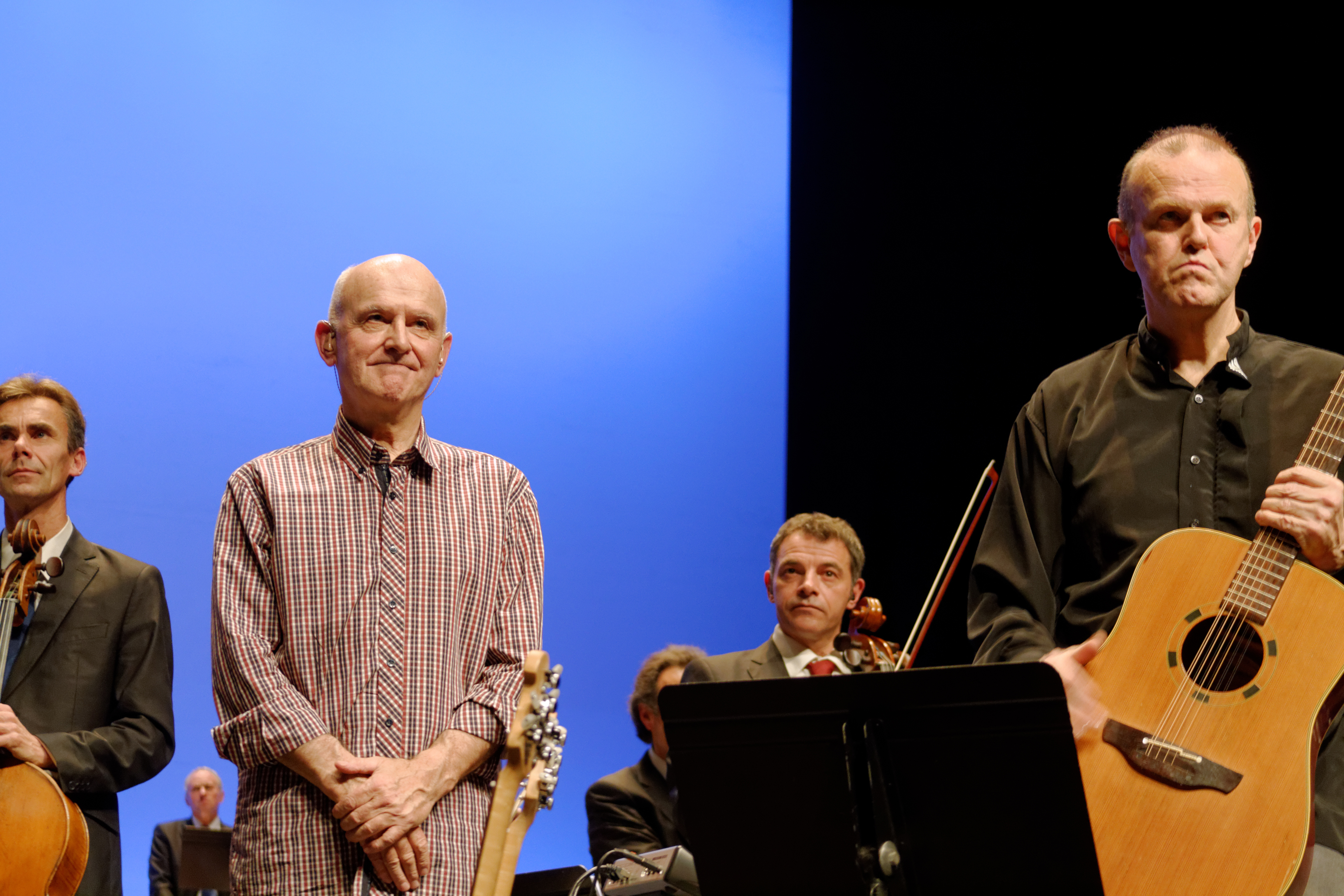 Projet Taliesin #1 de Dan Ar Braz et l'Orchestre symphonique de Bretagne au Théâtre National de Bretagne à Rennes le 18 décembre 2015. Premier concert interactif diffusé sur Internet et trois chaînes bretonnes.